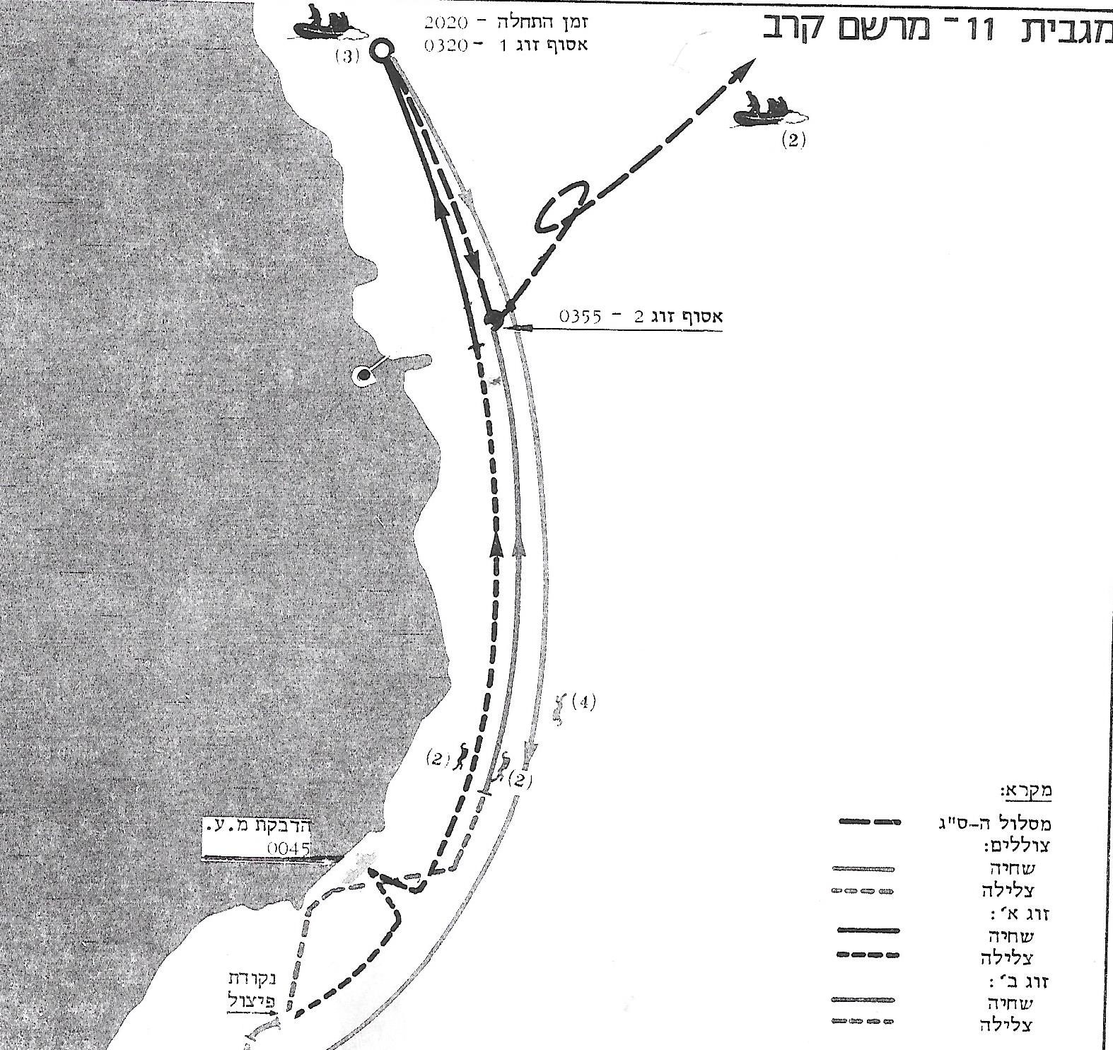 תרשים תנועת הצוללים וסירות הגומי בחוף ע'רדקה בפעולת מגבית 11